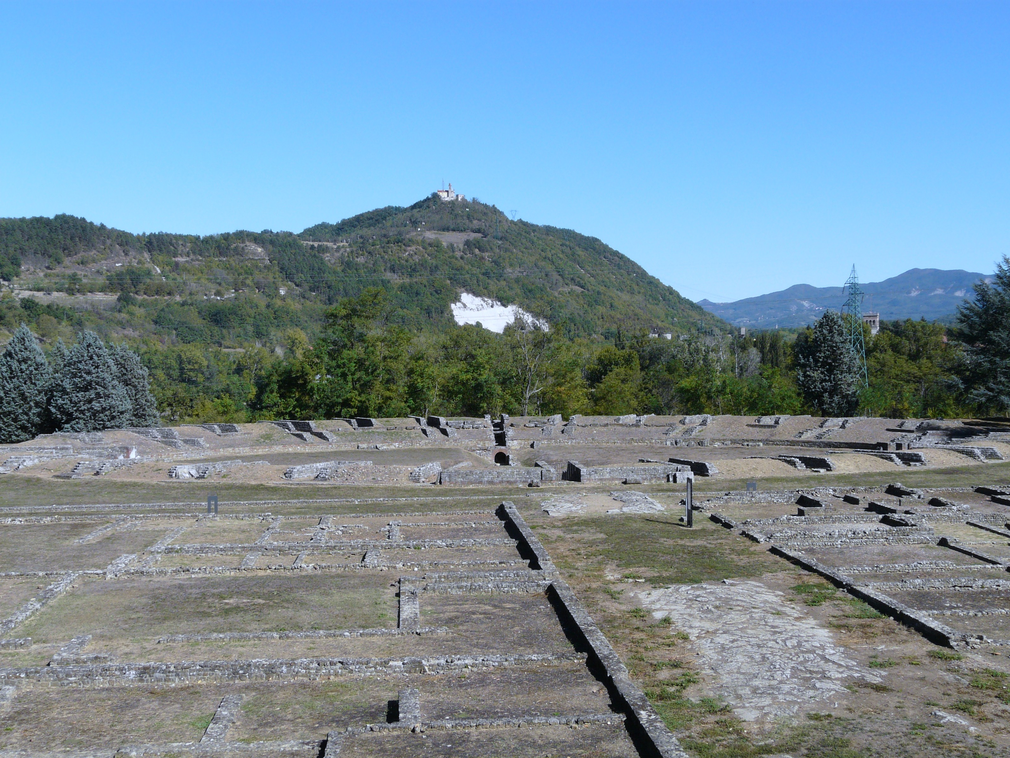 Immagini varie dei ritrovamenti dell'antica città romana di Libarna, oggi frazione di Serravalle Scrivia, Piemonte, Italy